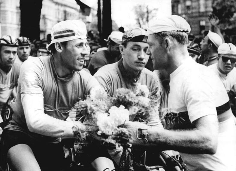 Friedensfahrt, Start, Kapitonow, Schur Zentralbild Wendorf Tre-Hoa 8.5.1961XIV. Internationale Friedensfahrt Warschau-Berlin-Prag 1961. 6. Etappe von Szozecin nach Rostock am 8.5.1961 UBz: Kurz vor dem Start zur 6. Etappe überreichte tradtitionsgemäß´der Mannschaftskapitän der DDR "Täve" Schur am Tage der Befreiung dem sowjetischen Kapitän Kapitonow mit viel Herzlichkeit einen Blumenstrauß